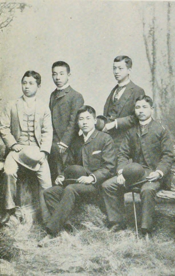 岩崎清七、大三輪奈良太郎、河崎晋、川崎八右衛門22歳、木村重太郎（二代目利右衛門）